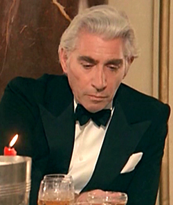 Képkocka „A kulcs” című filmből (Frank Finlay)